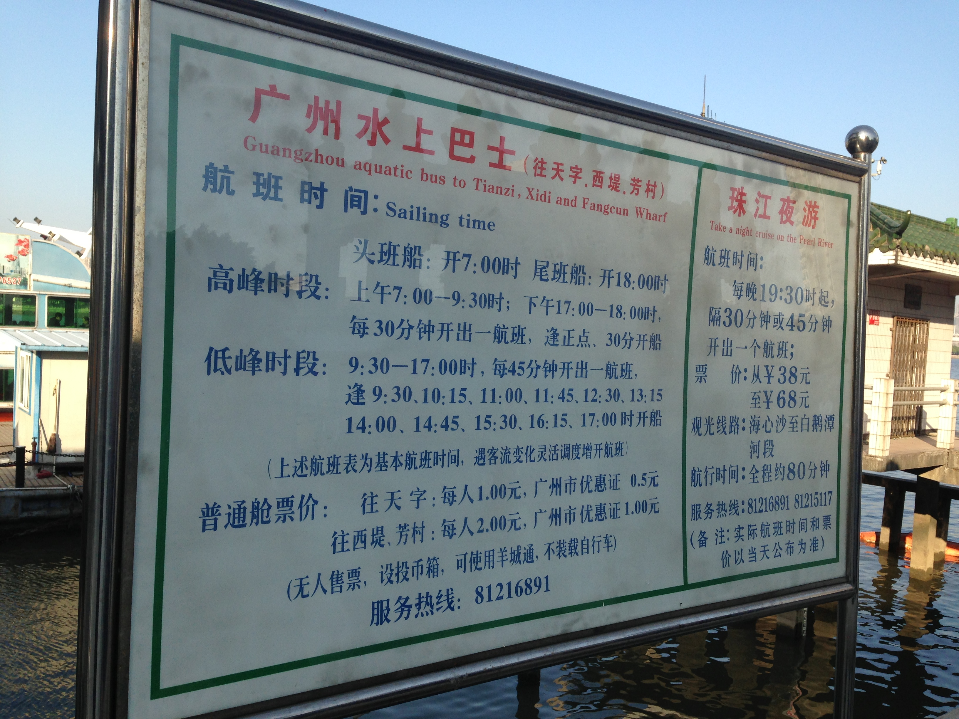 位於中山大學北門的中大碼頭